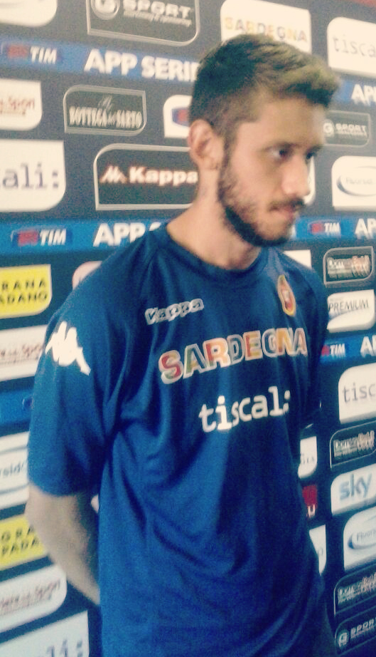 Foto scattata dal sottoscritto in mixed zone Licensing Benedetti, Simone